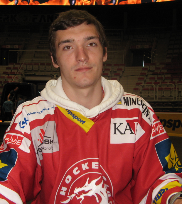 Po zakončení sezóny 2014/15 ve Werk Areně